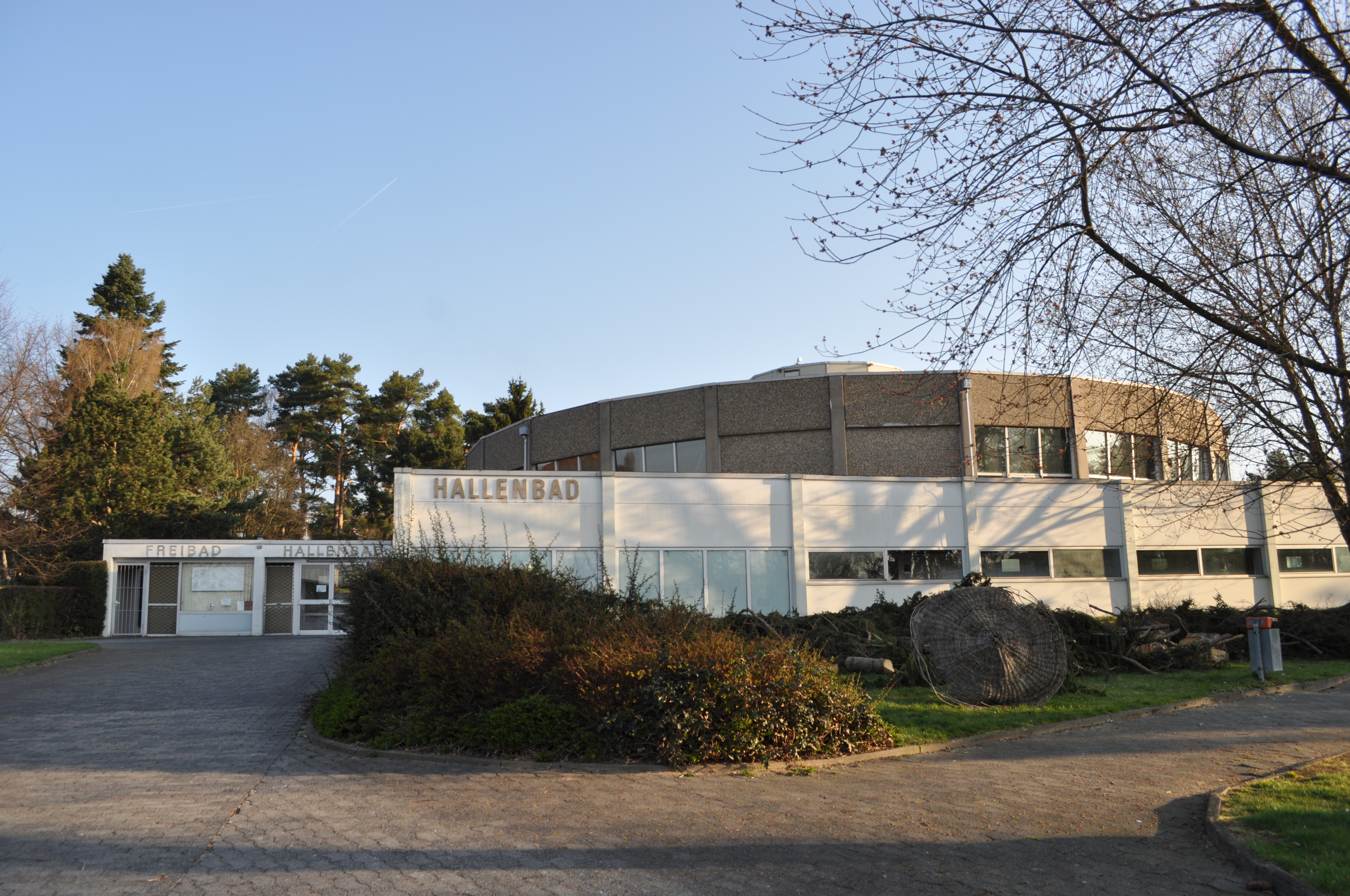 Frei- und Hallenbad in Oberursel vor der Sanierung/Neubau